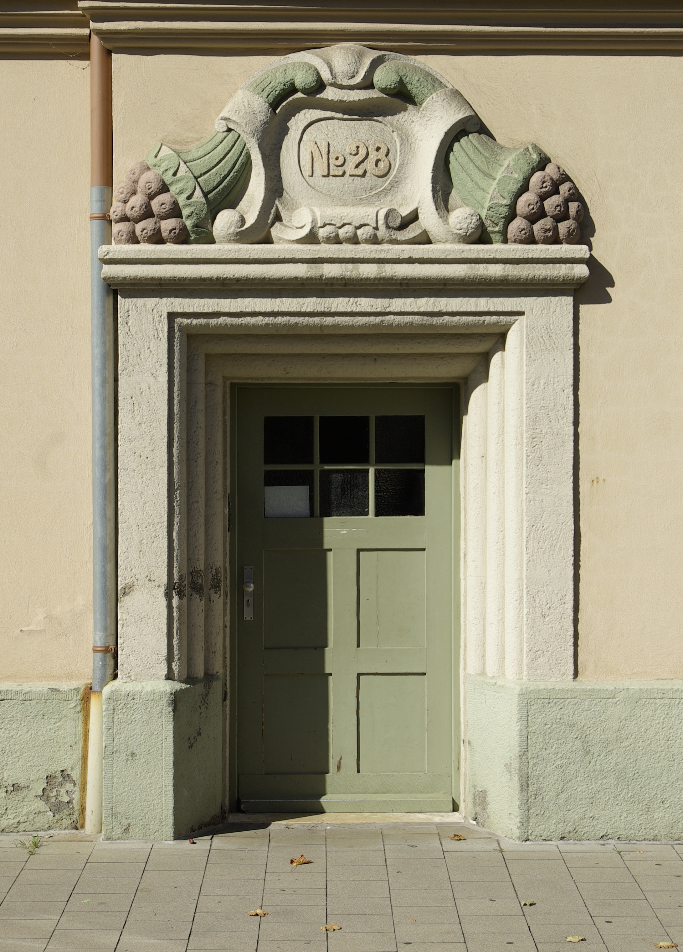 Wohnhaus Werner-von-Siemensstraße 24, 26, 28 / Stubenlohstraße in Erlangen